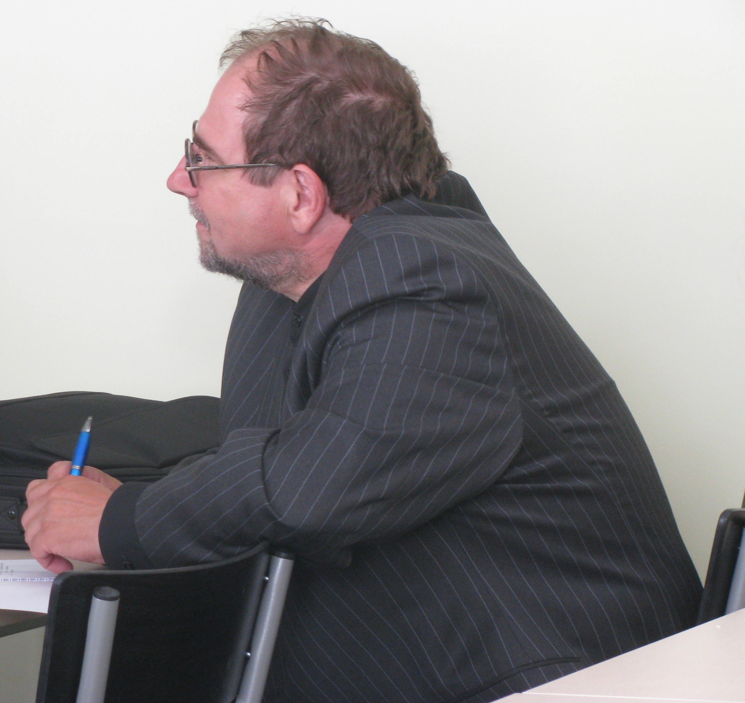 Enn Kasak Eesti filosoofia 7. aastakonverentsil Tartus